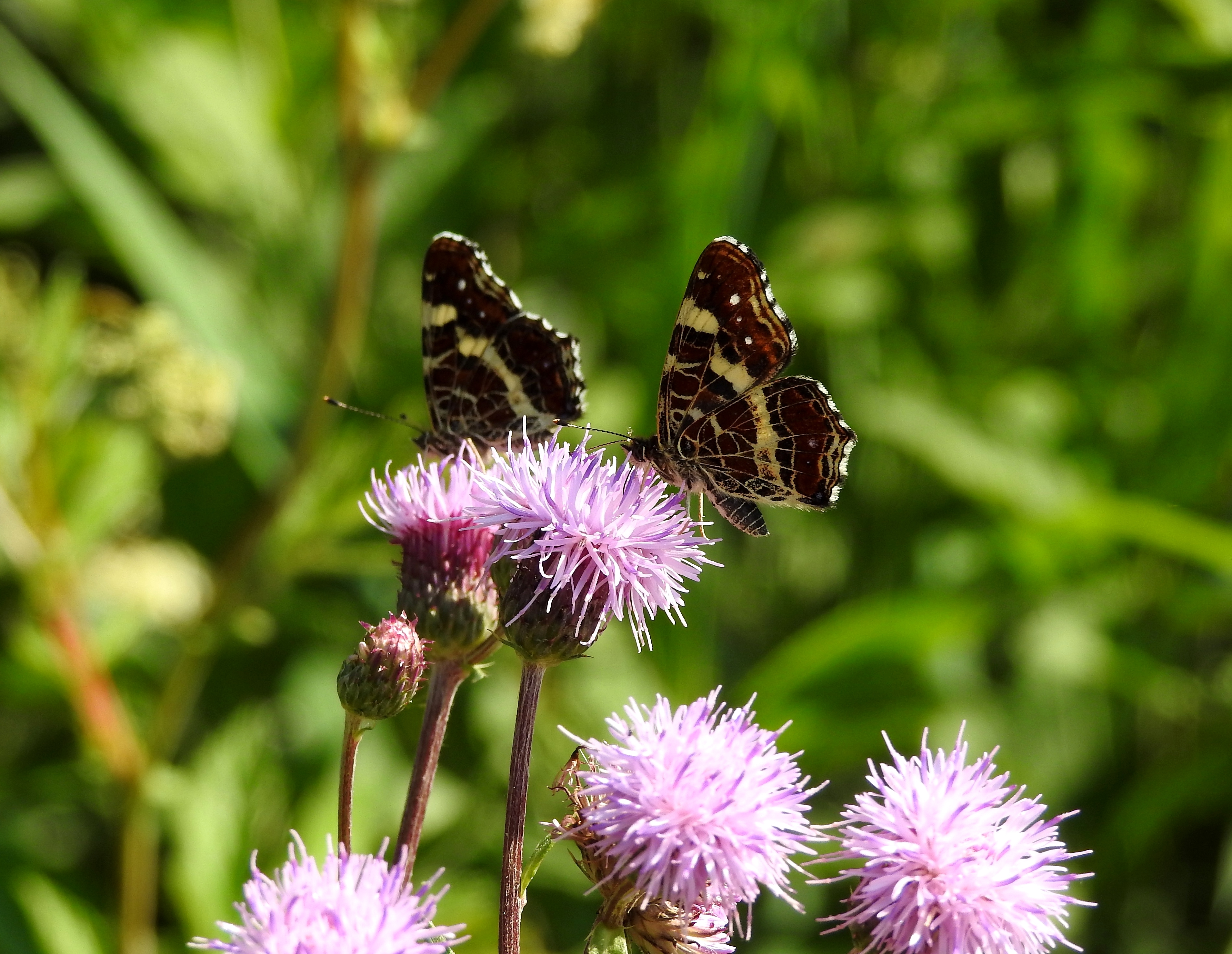 Andechs, OT Erling, Naturschutzgebiet „Mesnerbichl“. Zwei Landkärtchenfalter der Sommergeneration auf Acker-Witwenblumen.